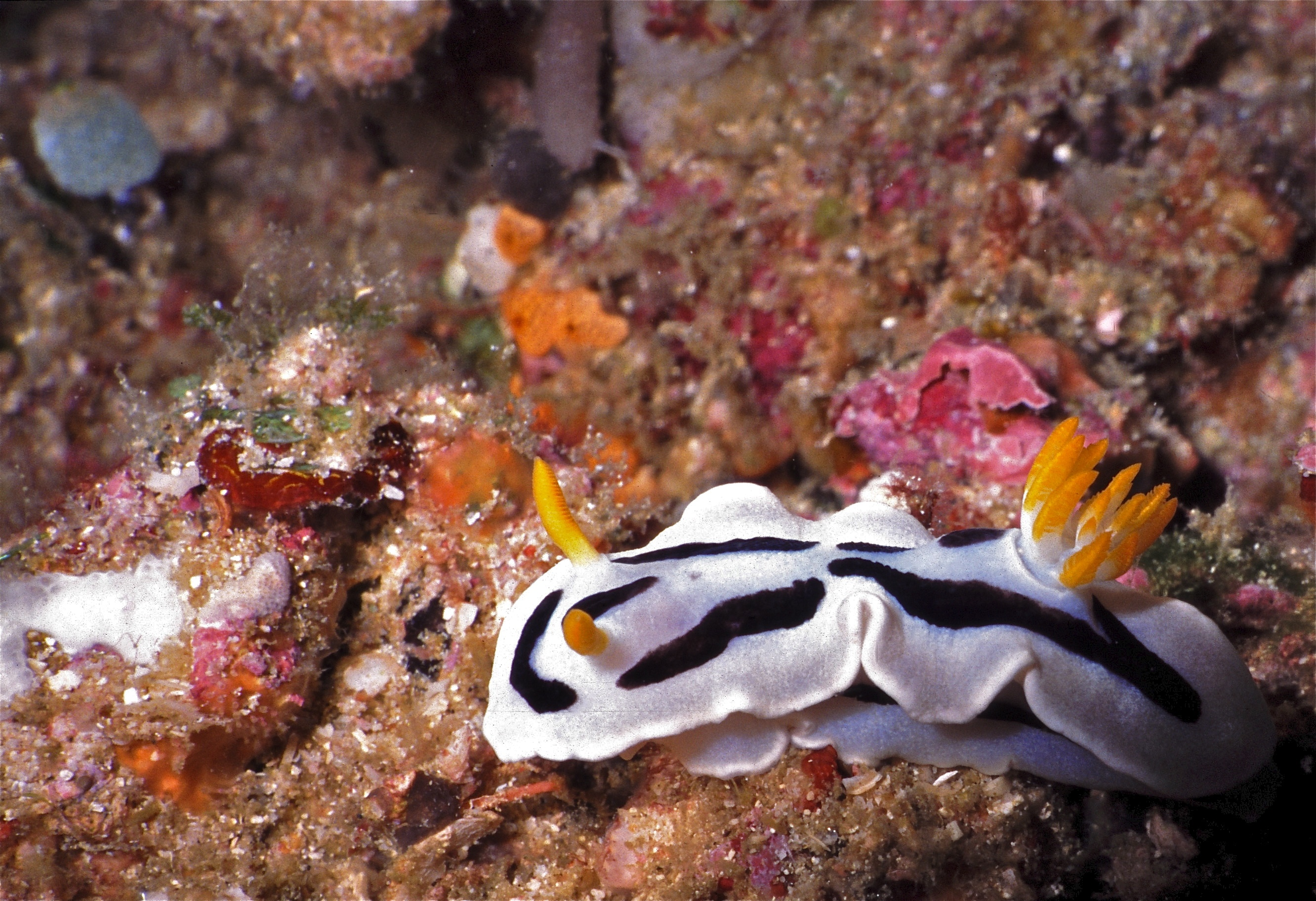 Bunaken, Sulawesi, INDONESIA